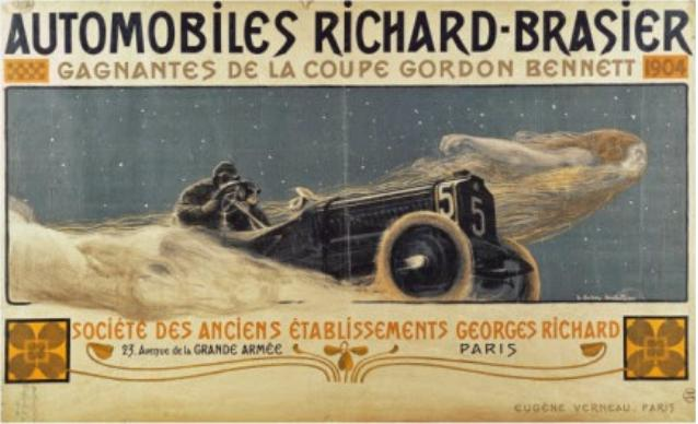 Publicité pour les automobiles Richard-Brasier, affiche lithographiée imprimée chez Eugène Verneau, Paris